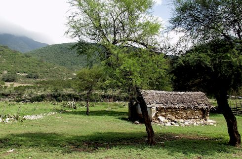 Casita rural - Iturbide, Nuevo León, México